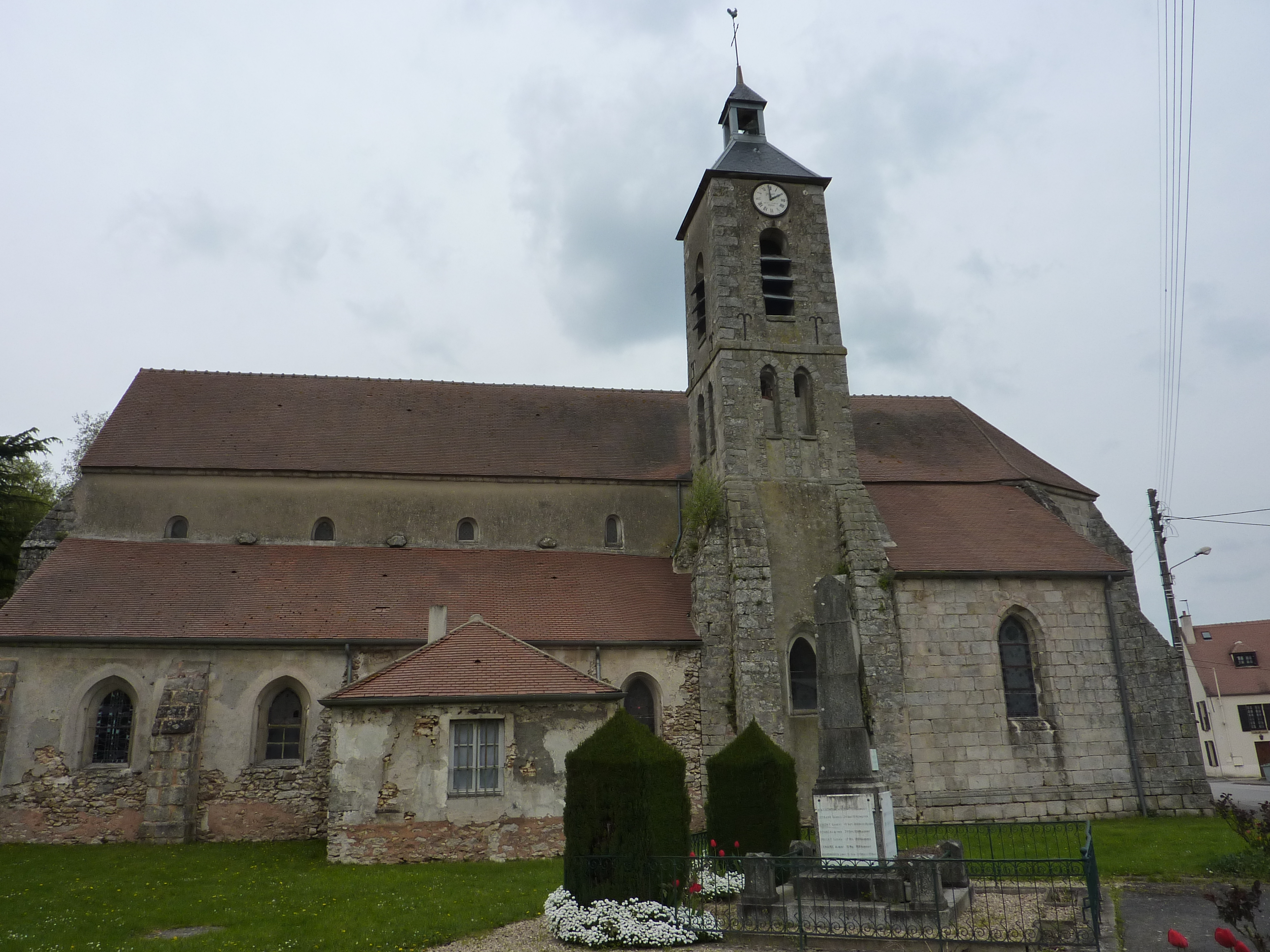 Située à Liverdy-en-Brie (77)